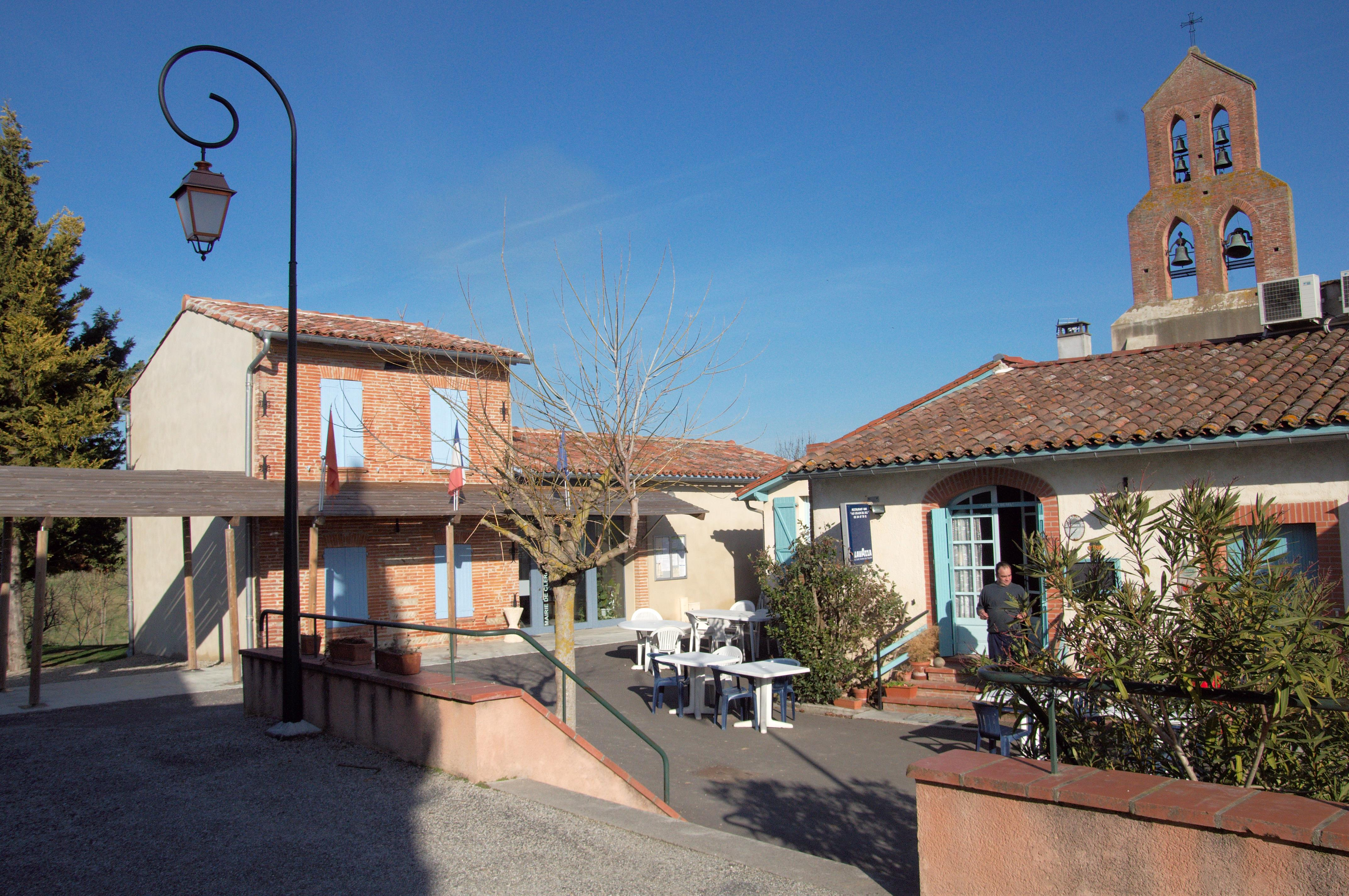 Place de la mairie de Clermont-le-Fort (Haute-Garonne/France)